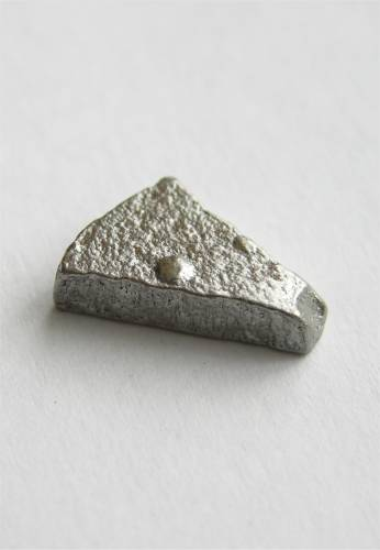 hochreines Eisen 99,97%